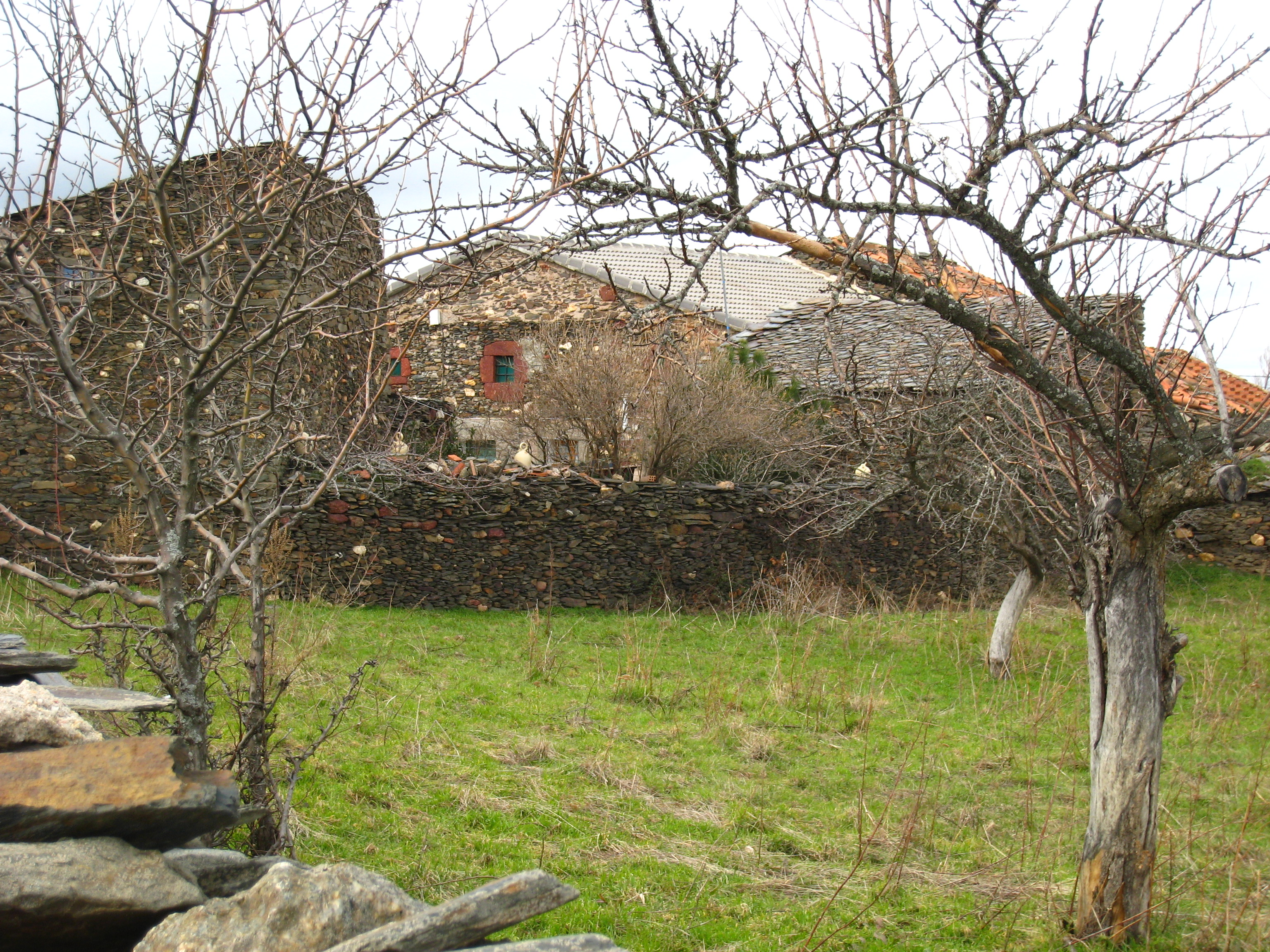 Becerril (Segovia), pueblo "negro" por su arquitectura tradicional de pizarra.